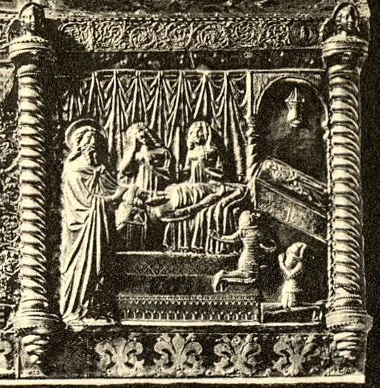 Relikviář sv. Simeona se smrtí Štěpána II. Bosenského